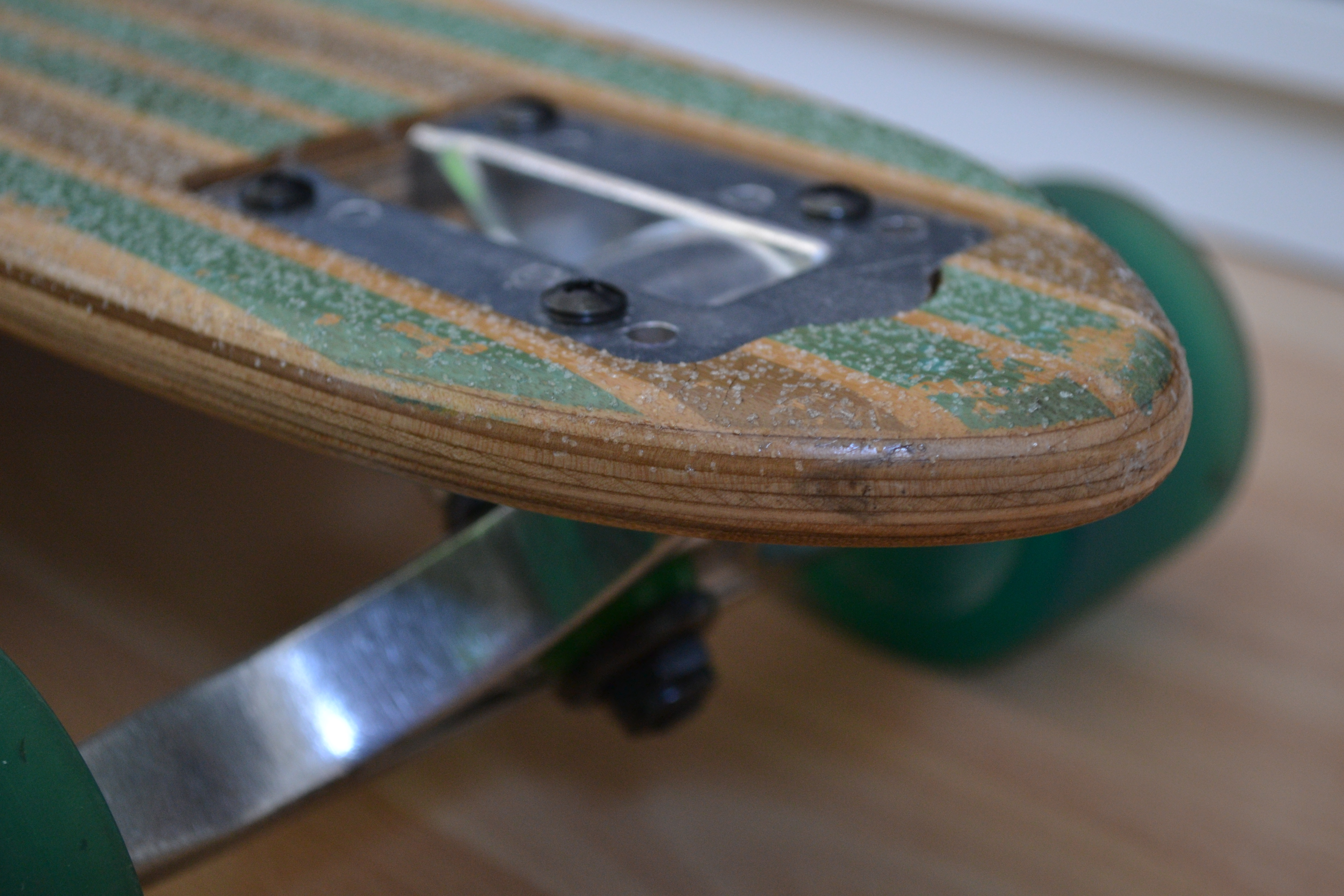 Longboard Globe Bamboo Prowler